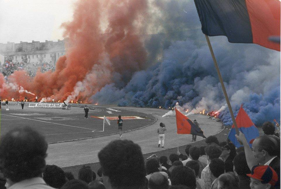 La mega fumogenata della curva sud dello Stadio San Vito di Cosenza durante la partita di campionato di serie C1 Cosenza- Nocerina di maggio 1988